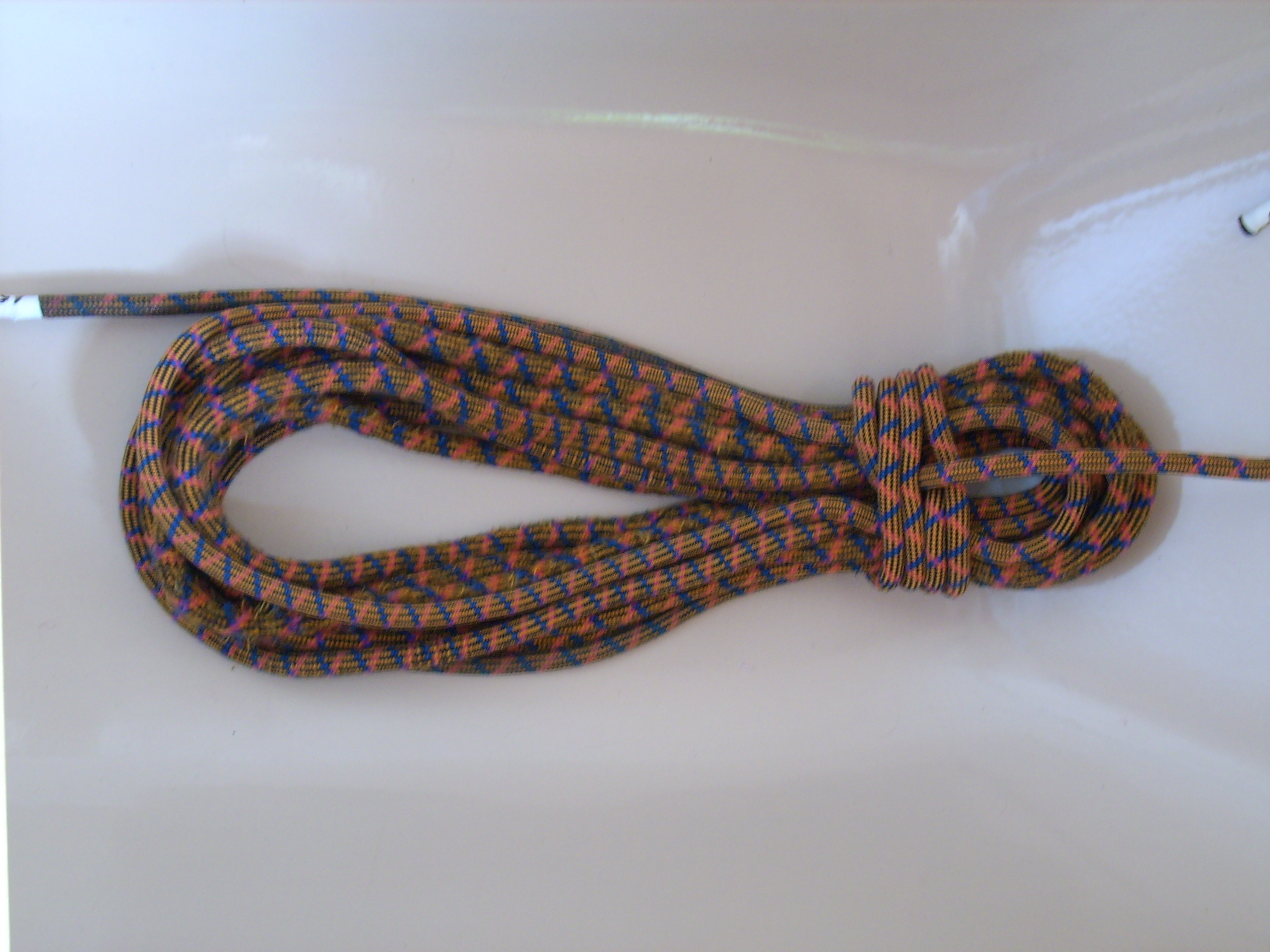 Leine aufschiessen, fertiger Bunsch